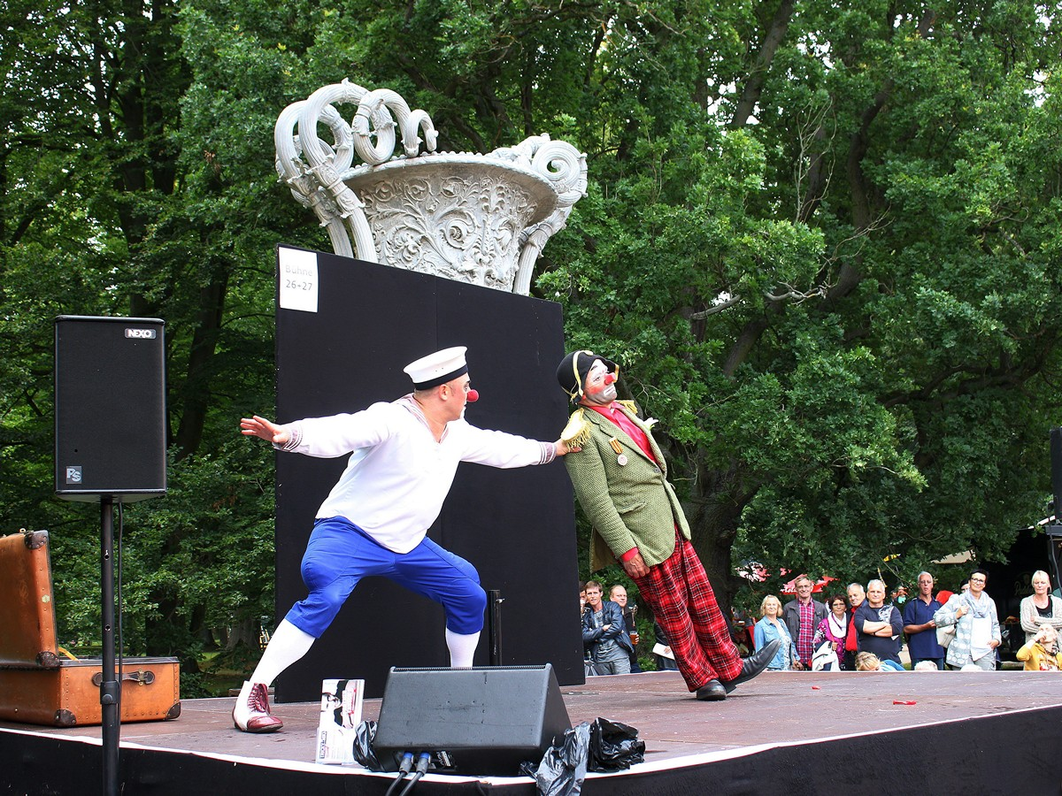 Pocosapiens Clowns beim Kleinen Fest im Großen Park in Ludwigslust. Die Künstler sind der Russe Edouard Neumann und der Spanier Oriol Boixader. [1]